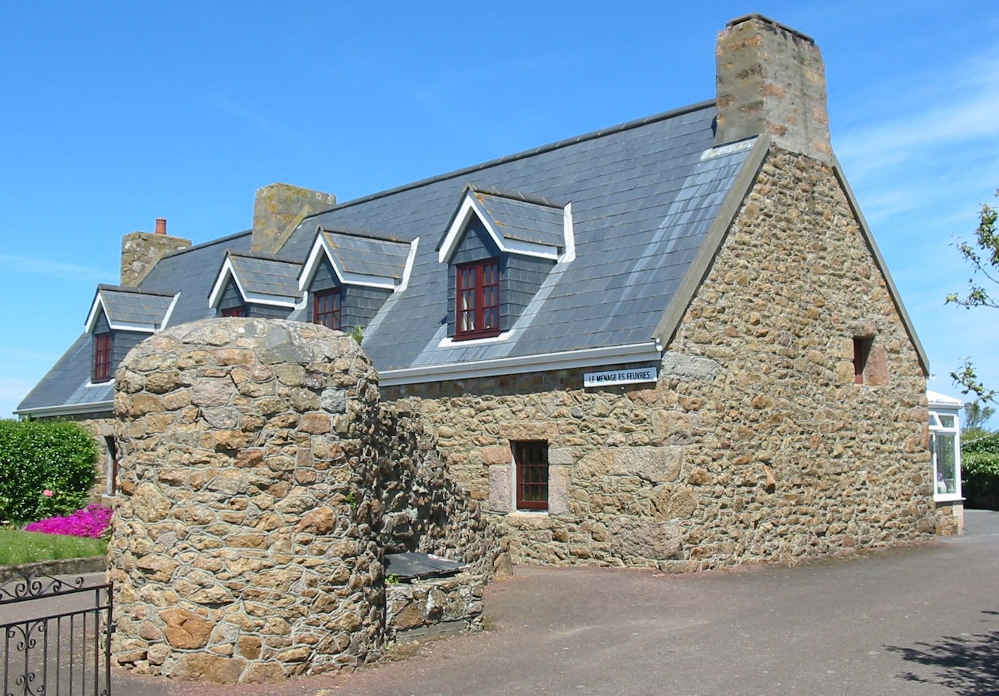 Le Ménage ès Feuvres, Saint Ouen, Jersey - former home of George F. Le Feuvre (George d'la Forge)